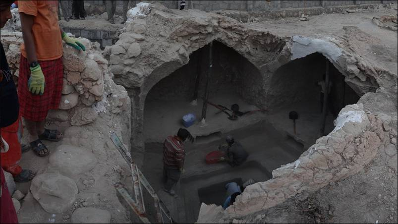 Category:بلدة كوخرد تصنيف:محافظة هرمزكان